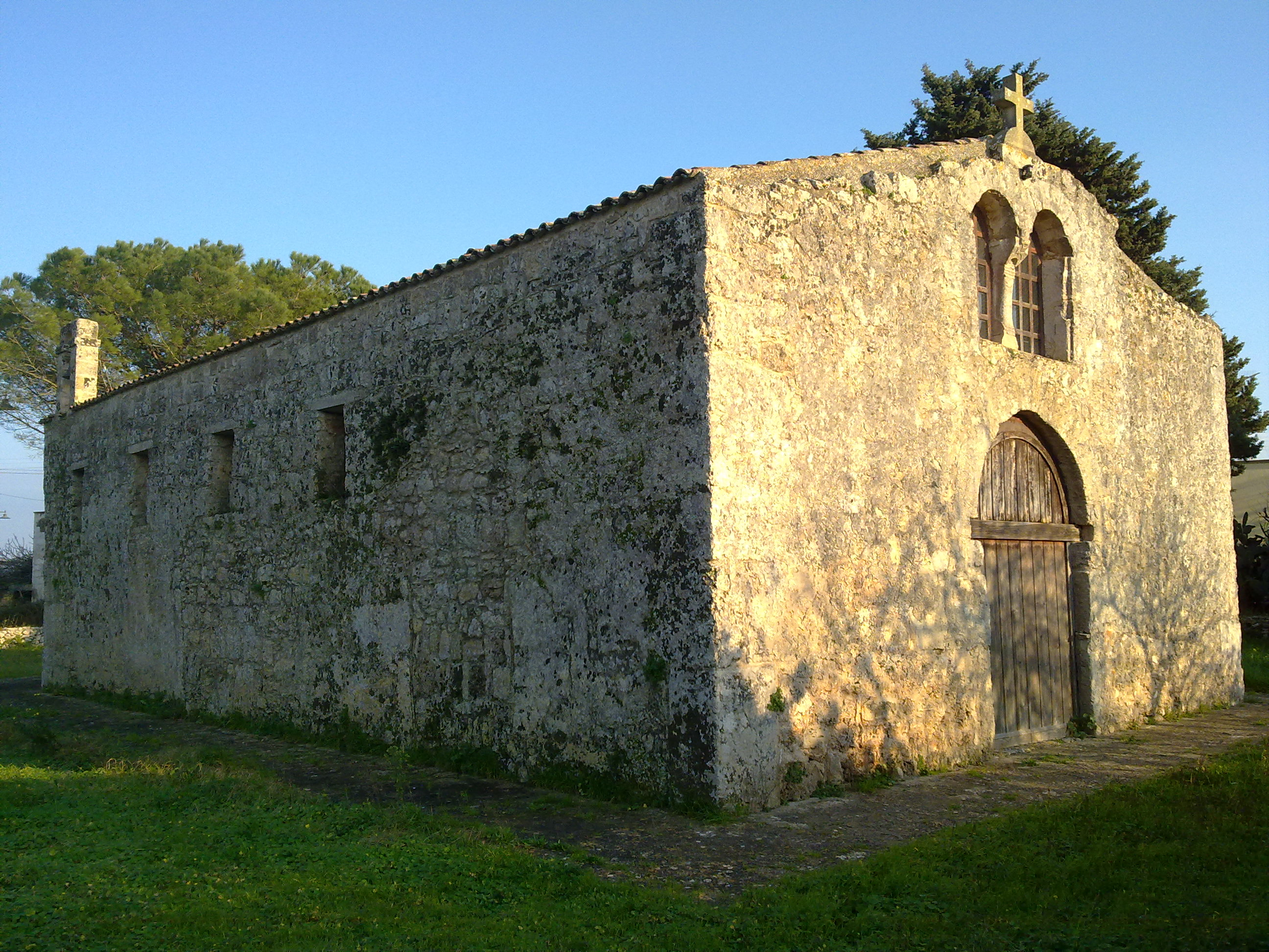 Chiesa Sant'Eufemia Specchia, Lecce